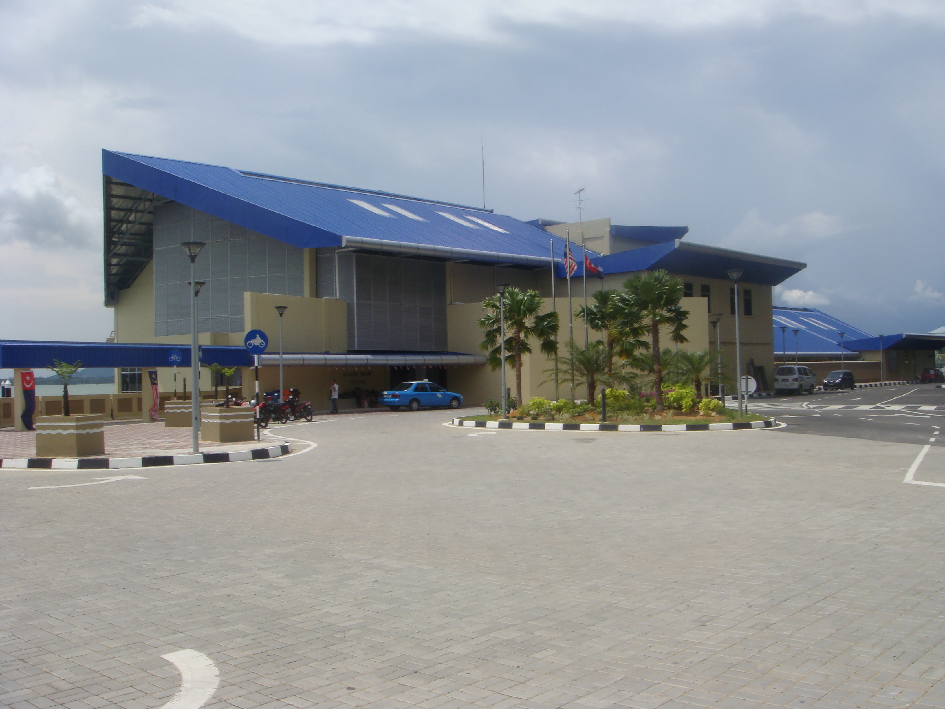 タンジュン・プングリ桟橋ターミナル・ビル